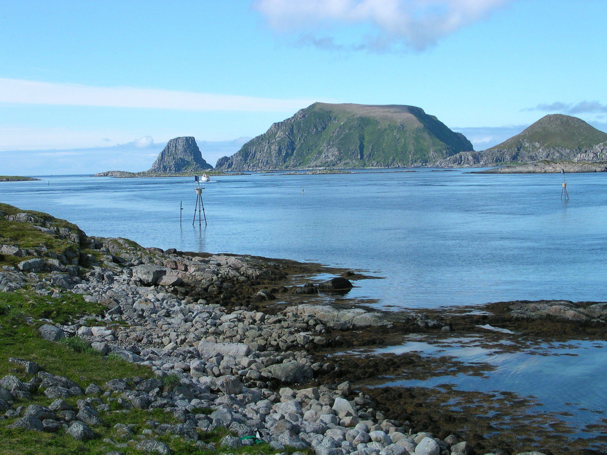 Gjesværstappan